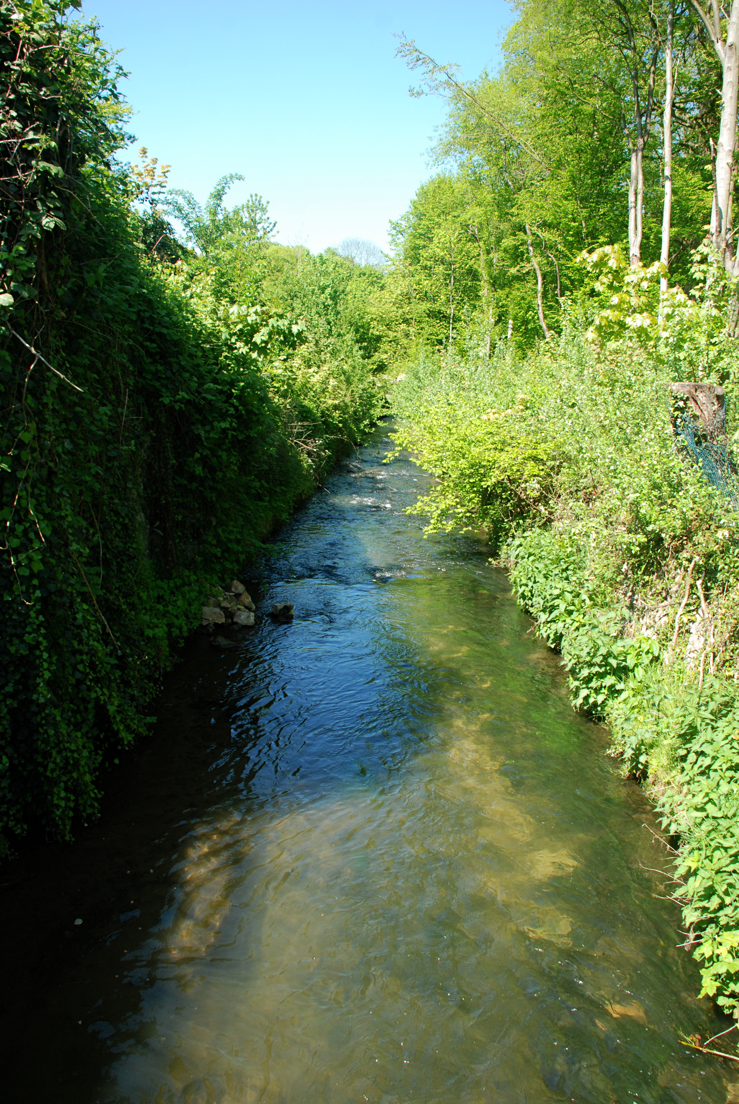 Belgique - Brabant wallon - Mont-Saint-Guibert - Hévillers - Orne à Bierbais